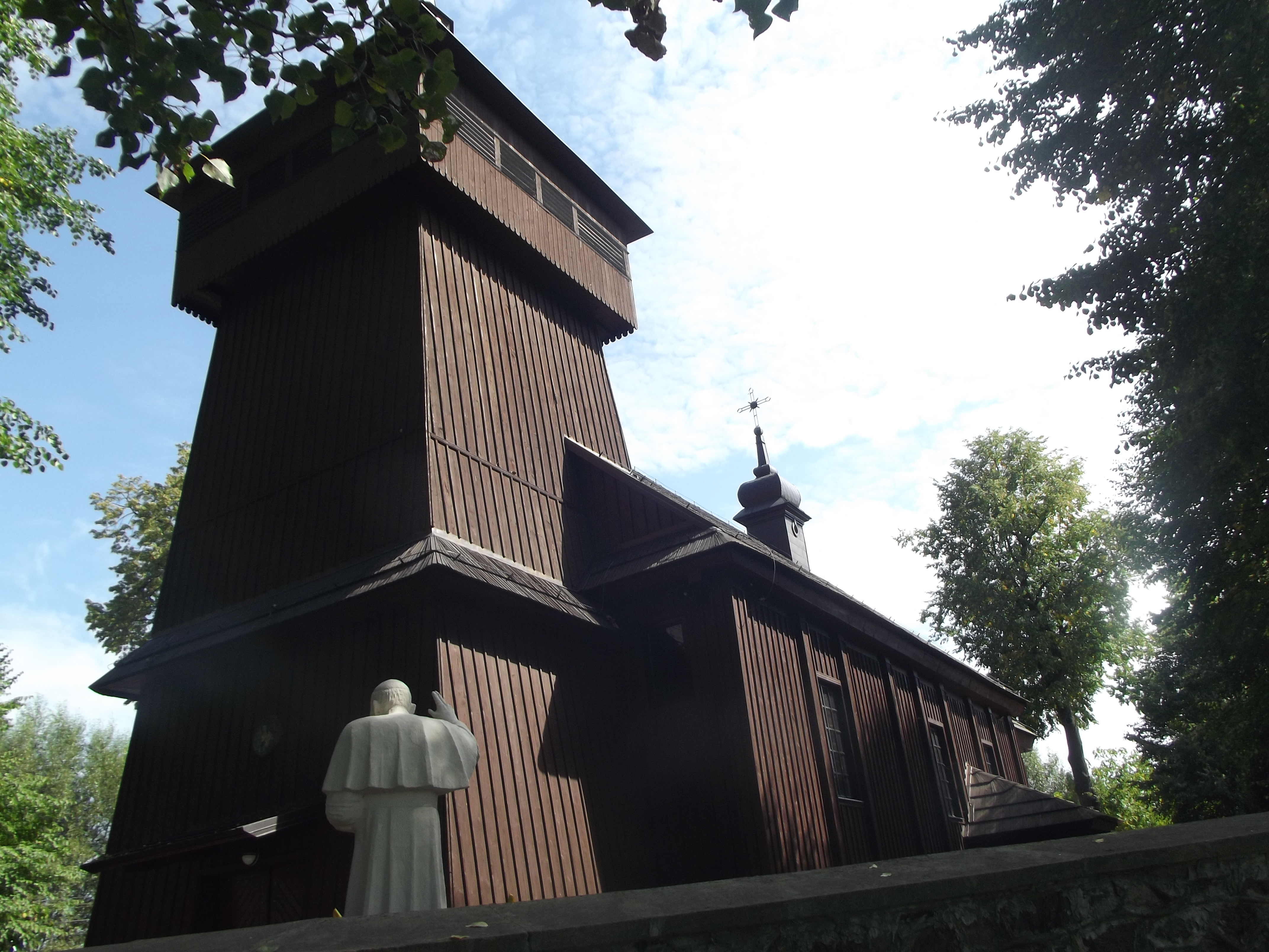 Kurdwanów - kościół parafialny p.w. Przemienienia Pańskiego, drewniany widok frontowy (zabytek nr 281)